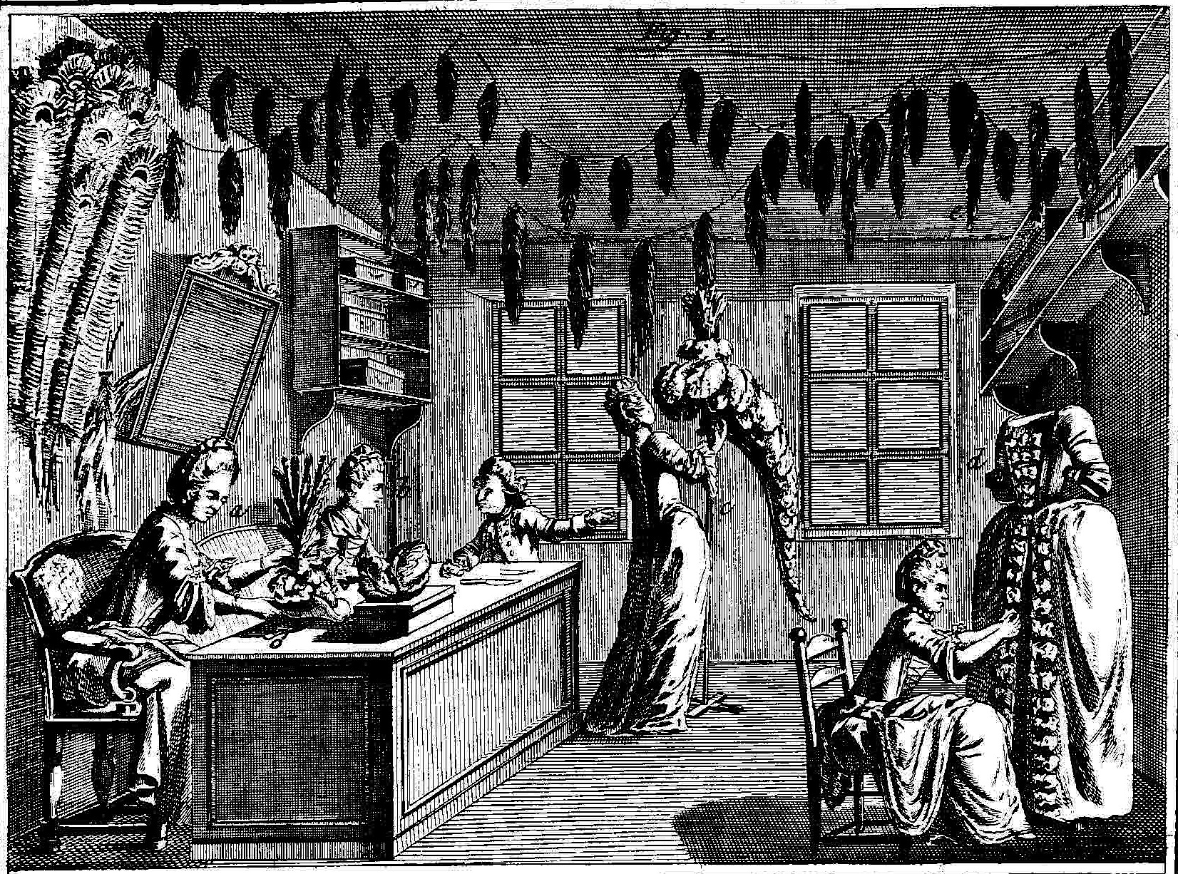 Atelier de plumassier XVIIIe siècle